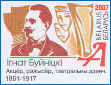 Ігнат Буйніцкі. Акцёр, рэжысёр, тэатральны дзеяч. 1861-1917. Партрэт І. Буйніцкага, маскі, заслона.